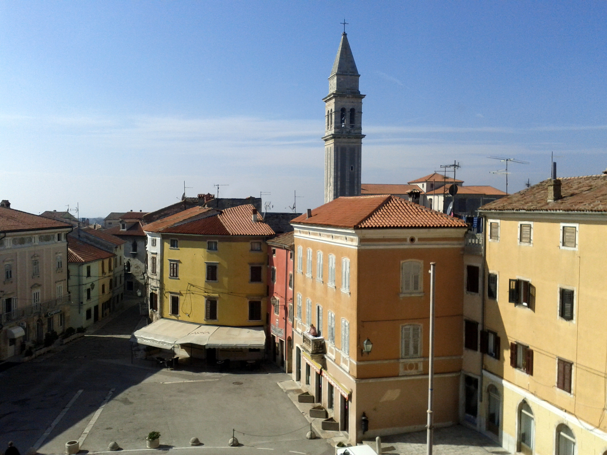 narodni trg 1